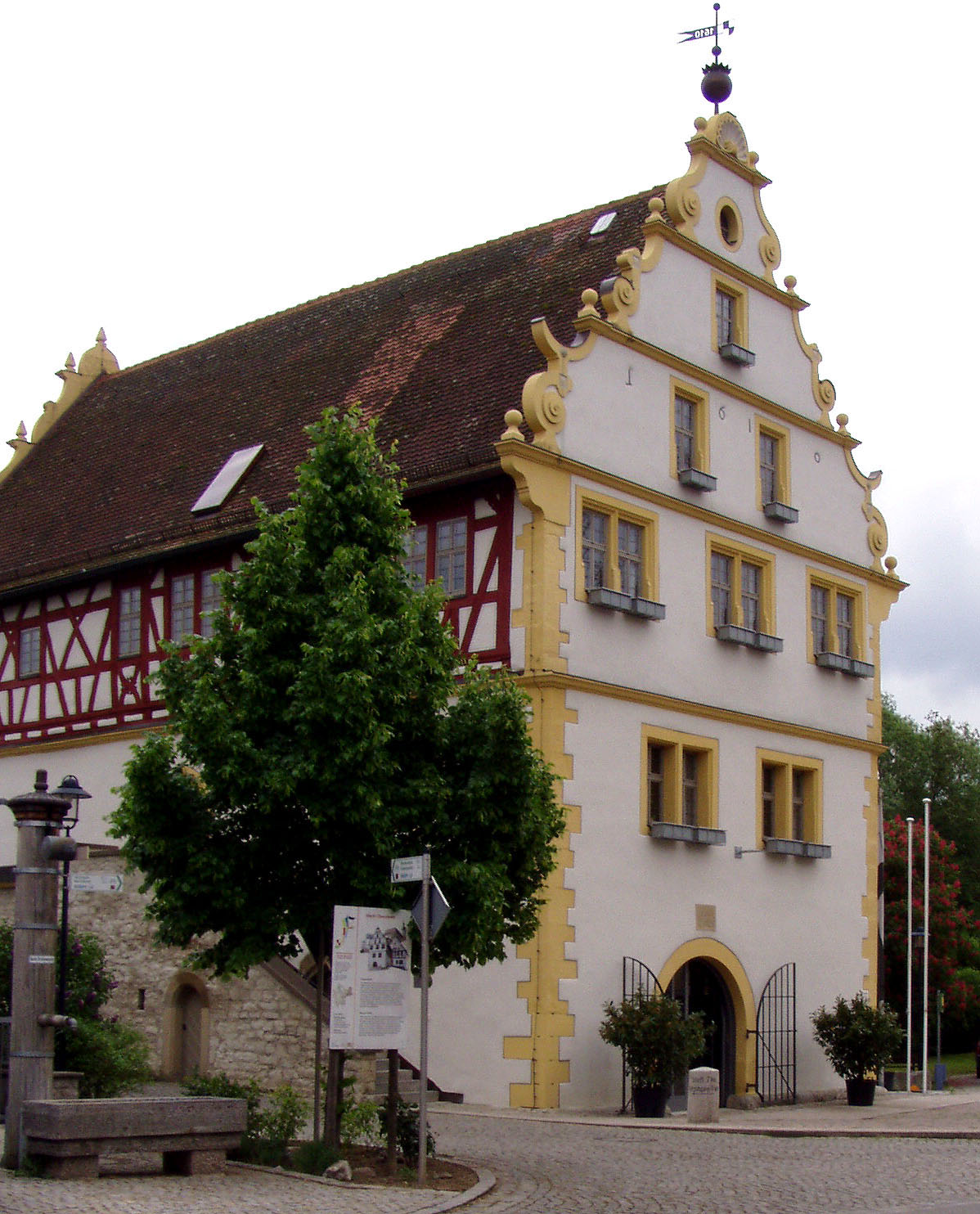 Rathaus im unterfränkischen Obernbreit